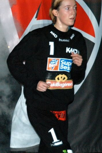 Katrine Lunde, Norwegian handballer